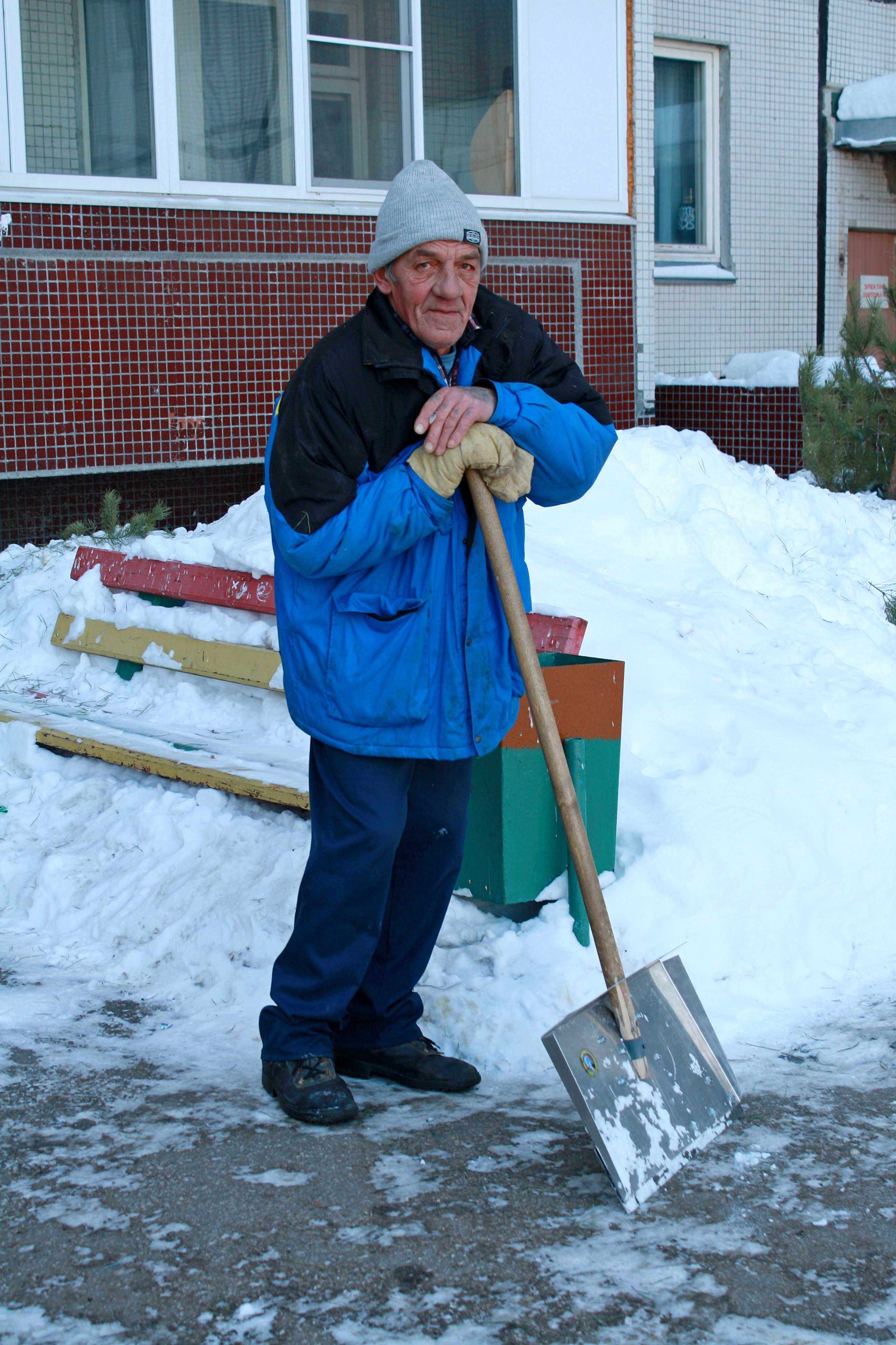 Дворник в одном из дворов г.Тольятти. Зима 2012 года.